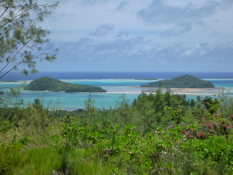 Vue rapprochée des îlots du centre (Hahake) du lagon de Wallis (Wallis et Futuna). Les îlots du centre vus depuis les hauteurs de l'île de Wallis (Wallis et Futuna). Luaniva (à gauche), Tekaviki (en tout petit à droite de Luaniva), Nukuhione (petit, au fond) et Fugalei (à droite). Wallis-et-Futuna